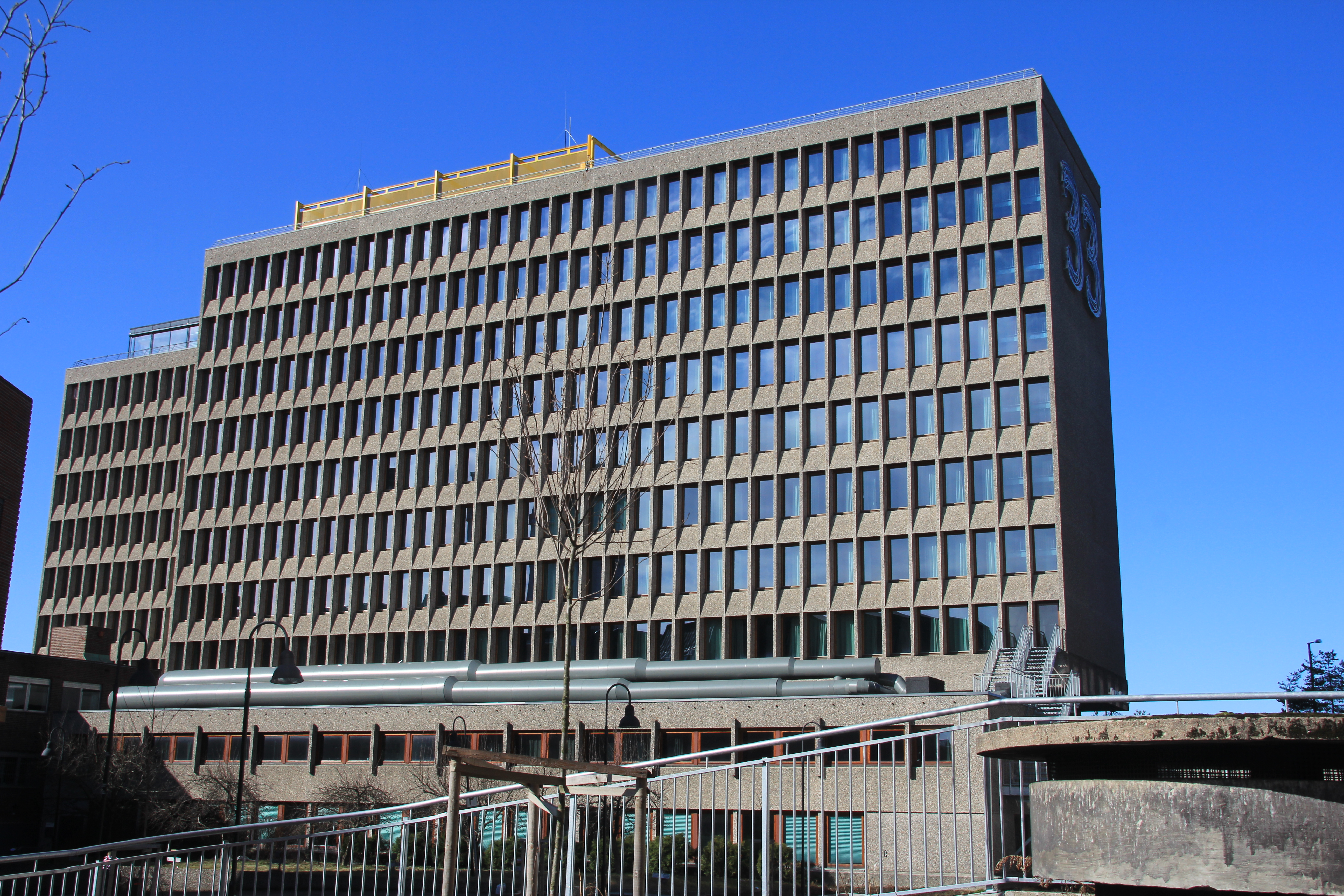 Quality Hotel 33 i Østre Aker vei 33, Oslo. Fasaden mot øst.